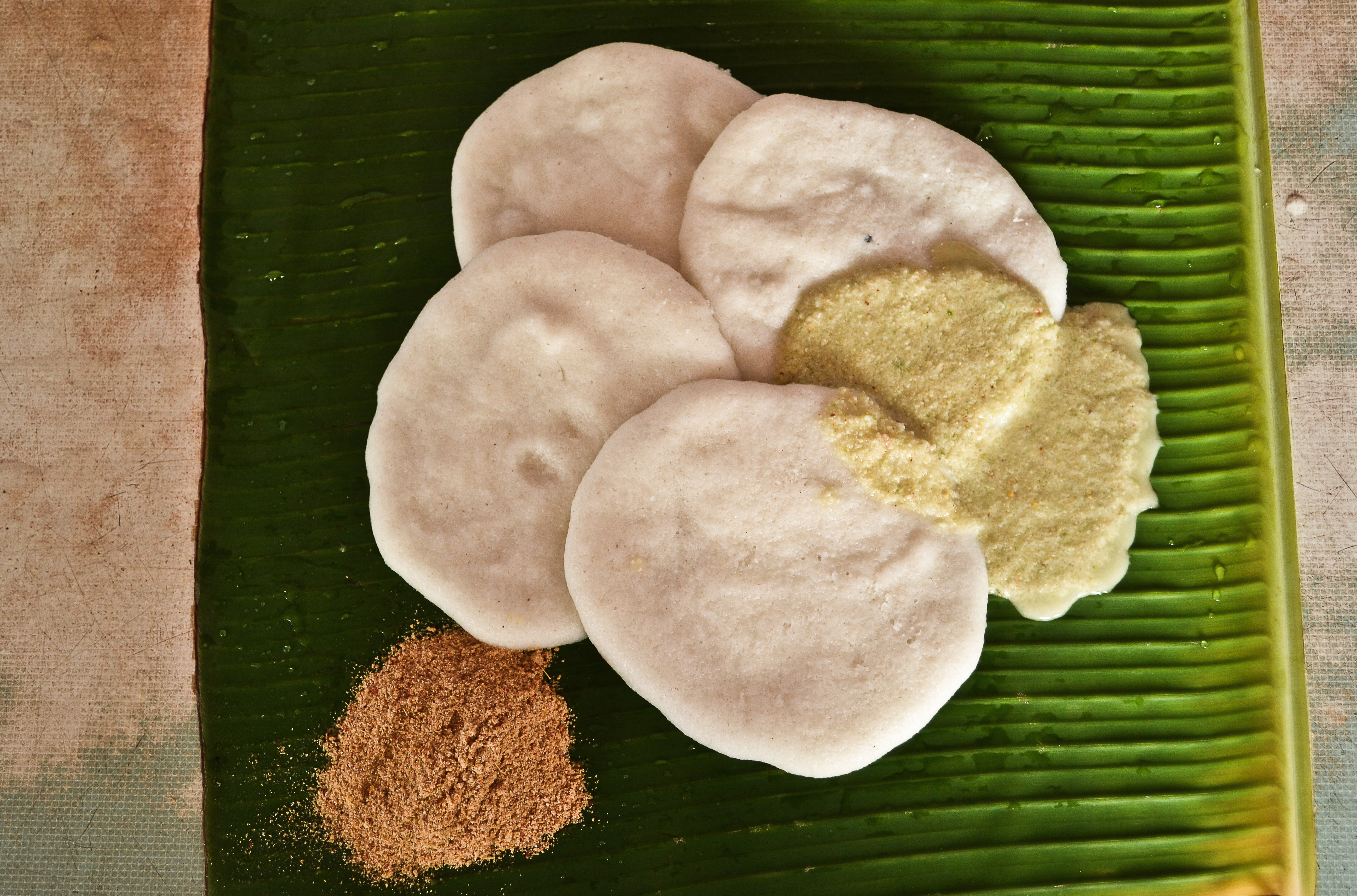 രാമശ്ശേരി ഇഡ്ഡലി കേരളത്തിൽ പാലക്കാട് ജില്ലയിലുള്ള രാമശ്ശേരി എന്ന ഗ്രാമത്തിലാണ് രുചിയിൽ വളരെ വ്യത്യാസമുള്ള രാമശ്ശേരി ഇഡ്ഡലി എന്ന പ്രത്യേക തരം ഇഡ്ഡലിയുള്ളത്. പാലക്കാടുനിന്നും വാളയാറിലേയ്ക്കുള്ള വഴിയിൽ പുതുശ്ശേരിക്ക് അടുത്ത് എലപ്പുള്ളി പഞ്ചായത്തിലാണ് രാമശ്ശേരി എന്ന ഗ്രാമം.[2] ഈ ഗ്രാമത്തിന്റെ പേര് തന്നെ ഈ ഇഡ്ഢലിപെരുമ കൊണ്ടാണ്. മുതലിയാർ സമുദായക്കാരാണ് ഇതുണ്ടാക്കുന്നത്. തമിഴ്നാട്ടിലെ കാഞ്ചീപുരത്ത് നിന്നും പാലക്കാട്ടേയ്ക്ക് കുടിയേറിയവരാണ് ഇവിടെയുള്ള മുതലിയാർ കുടുംബങ്ങൾ. മുമ്പ് 60 ഓളം കുടുംബങ്ങൾ ഇഡ്ഢലി ഉണ്ടാക്കി വിറ്റിരുന്നുന്നെങ്കിൽ, ഇന്ന് നാലഞ്ചു കുടുംബങ്ങളേ ഈ ഇഡ്ഡലി ഉണ്ടാക്കുന്നുള്ളൂ.